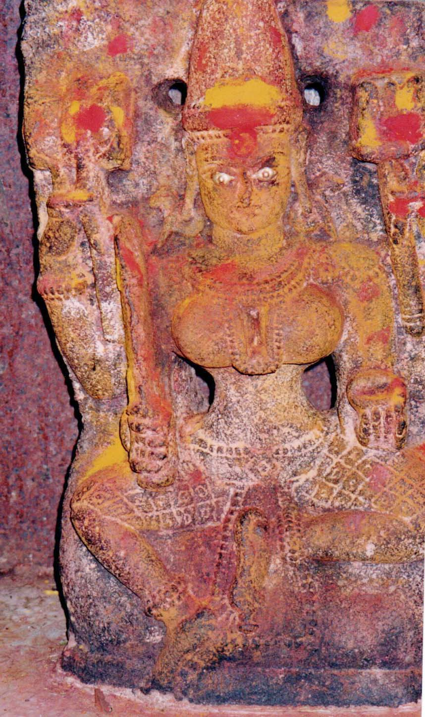 మావూరి పోచమ్మతల్లి